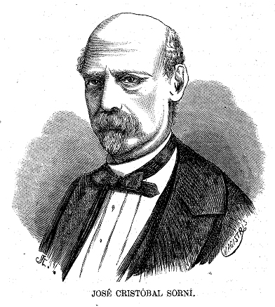 José Cristóbal Sorní en la revista española El Museo Universal.